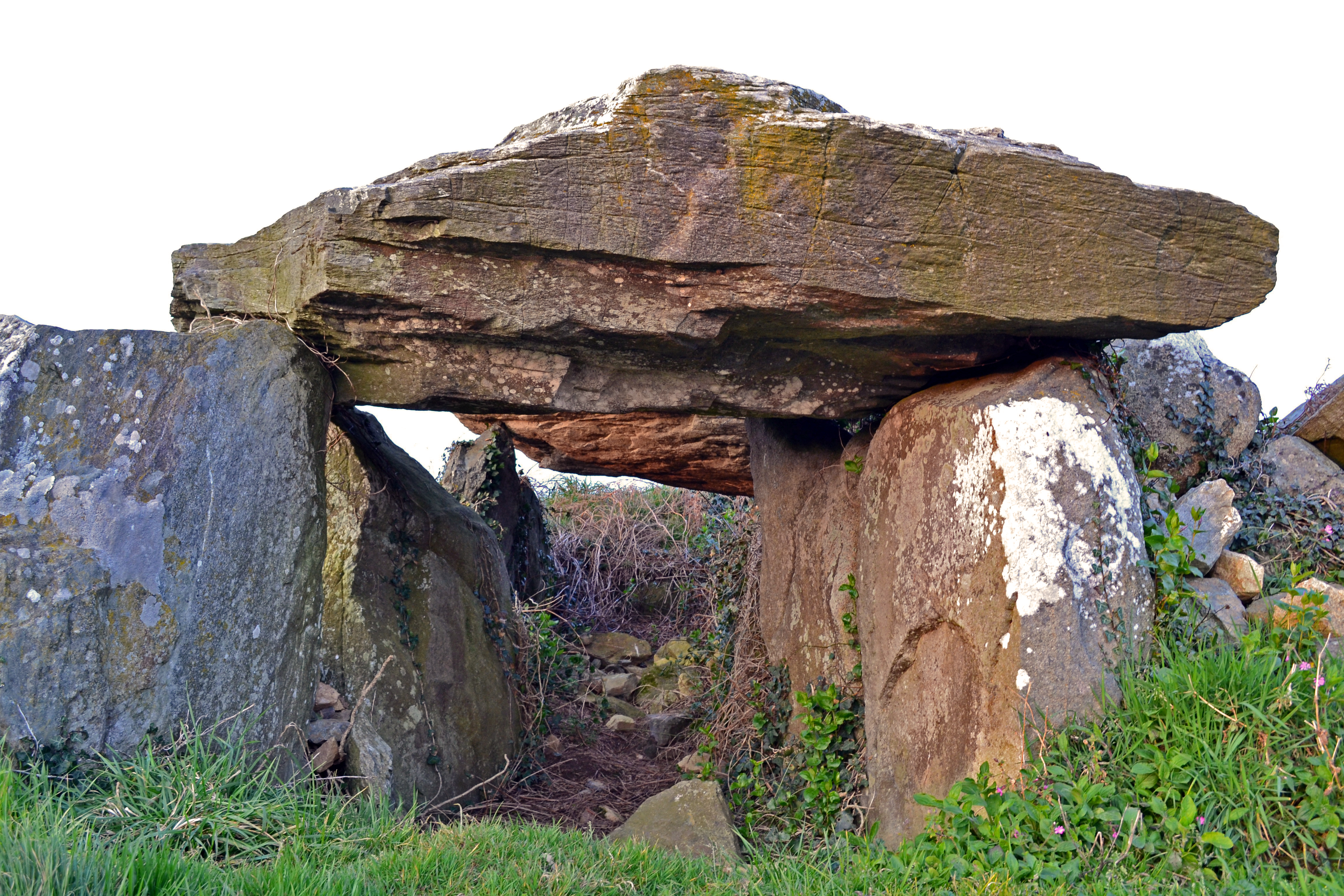 Dolmen de Boutouiller à Saint-Pol-de-Léon.